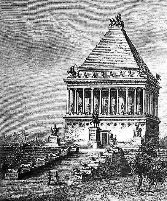 Le Tombeau de Mausole, selon gravure du XIXè siècle.